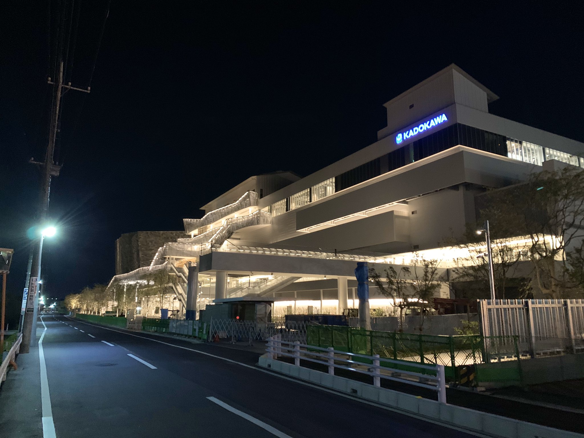 ところざわサクラタウンは、KADOKAWAによる文化施設。